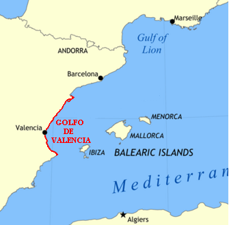 Mapa del Golfo de Valencia